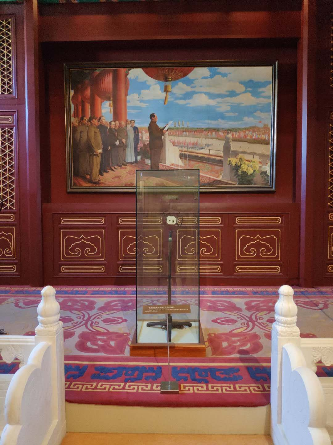 Slikano u Nacionalnom muzeju Kine u Pekingu u julu 2018. Slika je najvažniji element kineskog savremenog slikarstava koji opisuje stvaranje NR Kine.